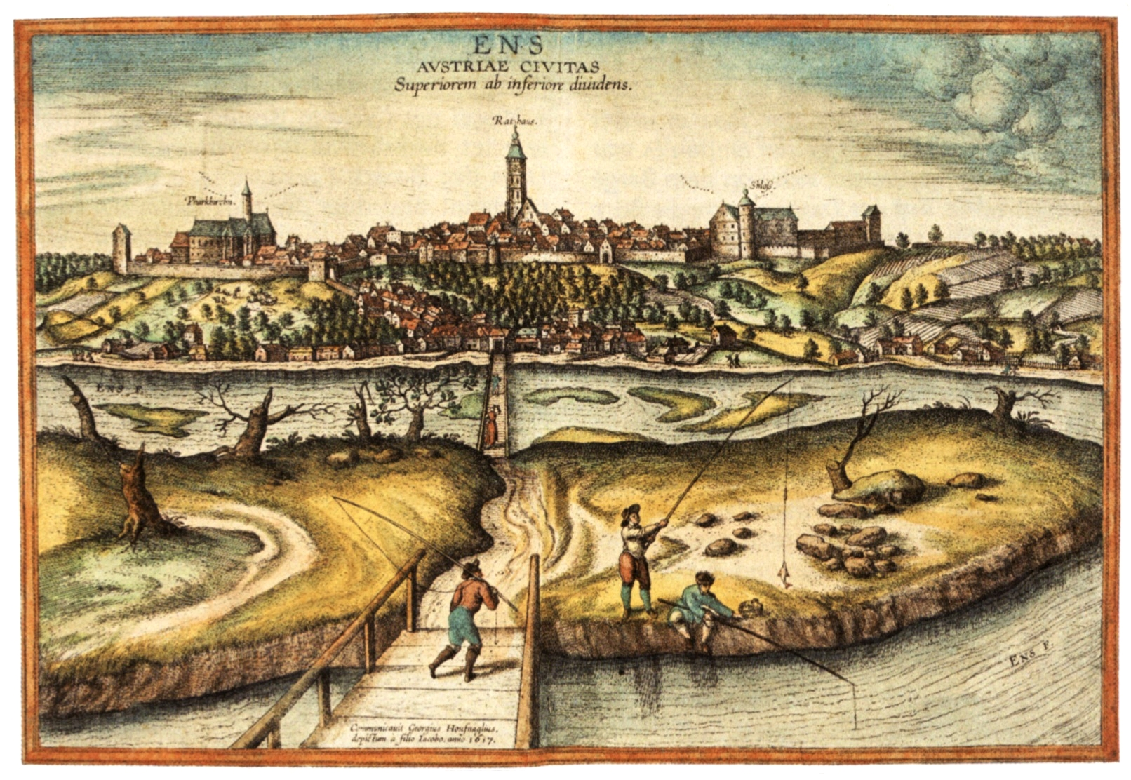 Historische Ansicht der Stadt Enns.